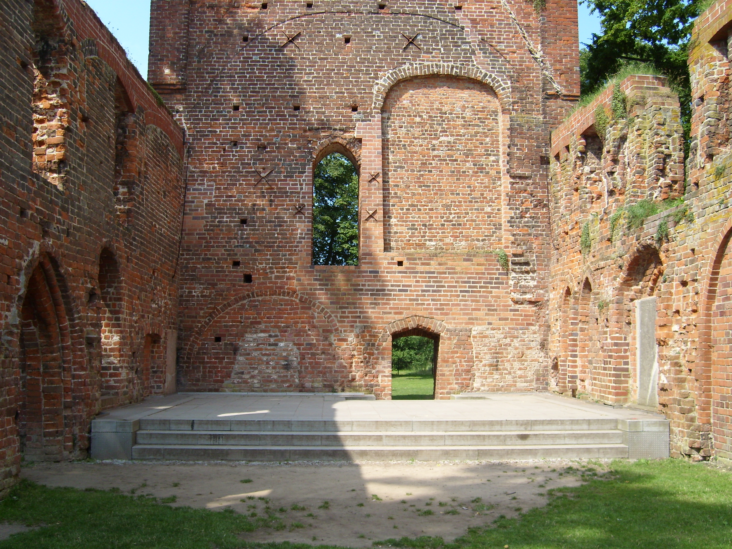 Klosterruinen Eldena mit der 1968 eingebauten Freilichtbühne im Sommer 2007